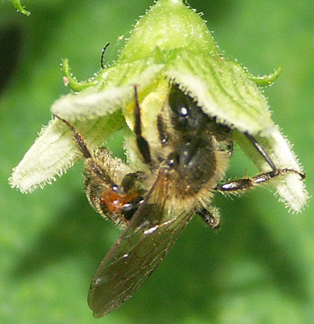 Andrena florea mâle, butinant une Bryone dioïque (Bryonia dioica, Cucurbitaceae).